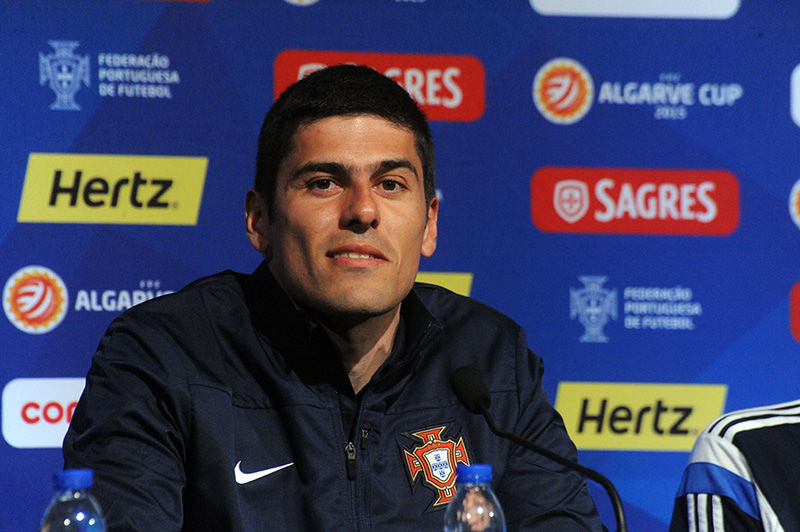 a_73_4714